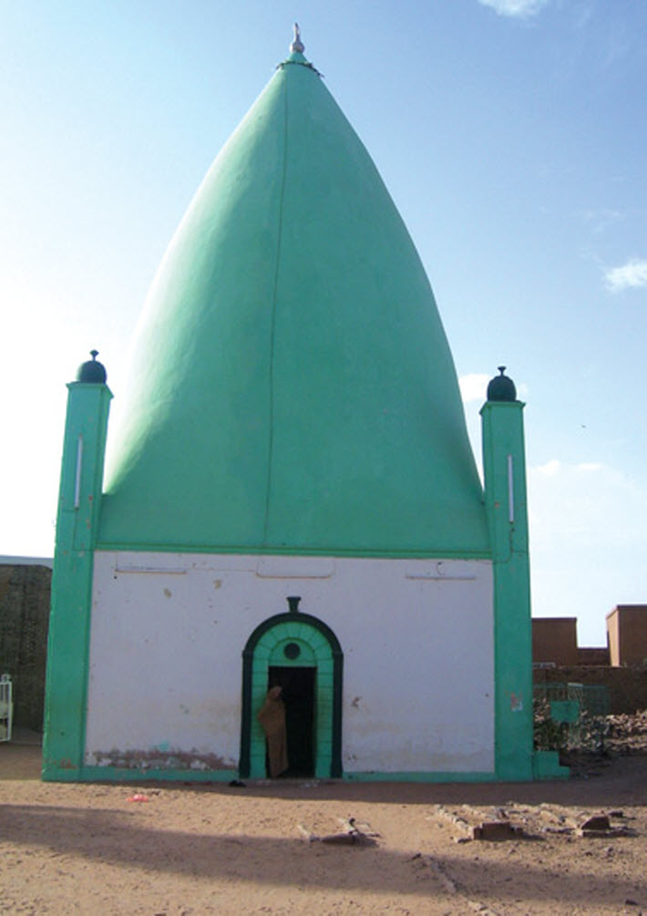 العيلفون